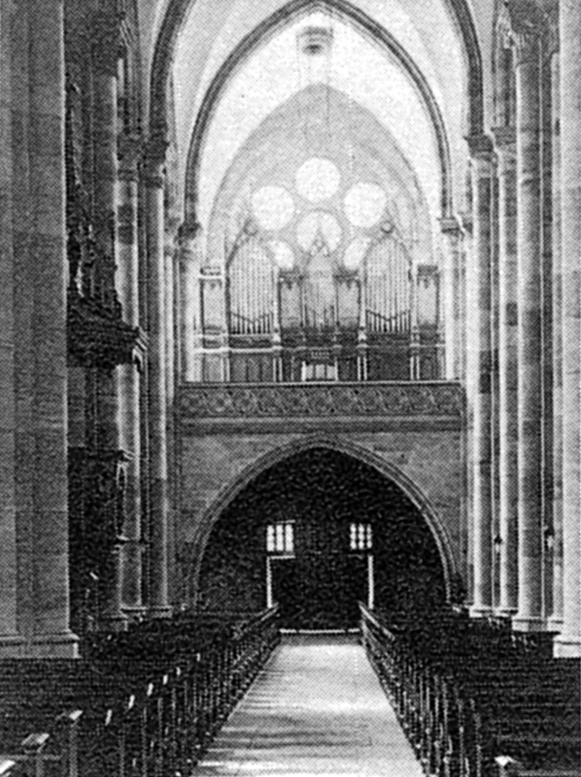 Die Voit-Orgel der Heilig-Kreuz-Kirche in Zweibrücken 1879-1945